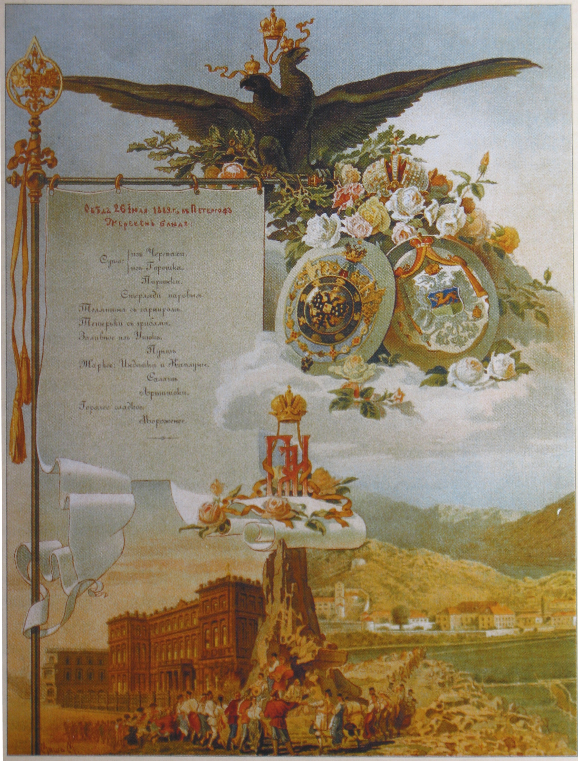 Микешин. Меню бракосочетания вел.князя Петра Николаевича с княжной Милицей Черногорской: суп из черепахи, стерлядь, тетерьки, заливное из уток и т.п. Петергоф, 26 июля 1889 года.